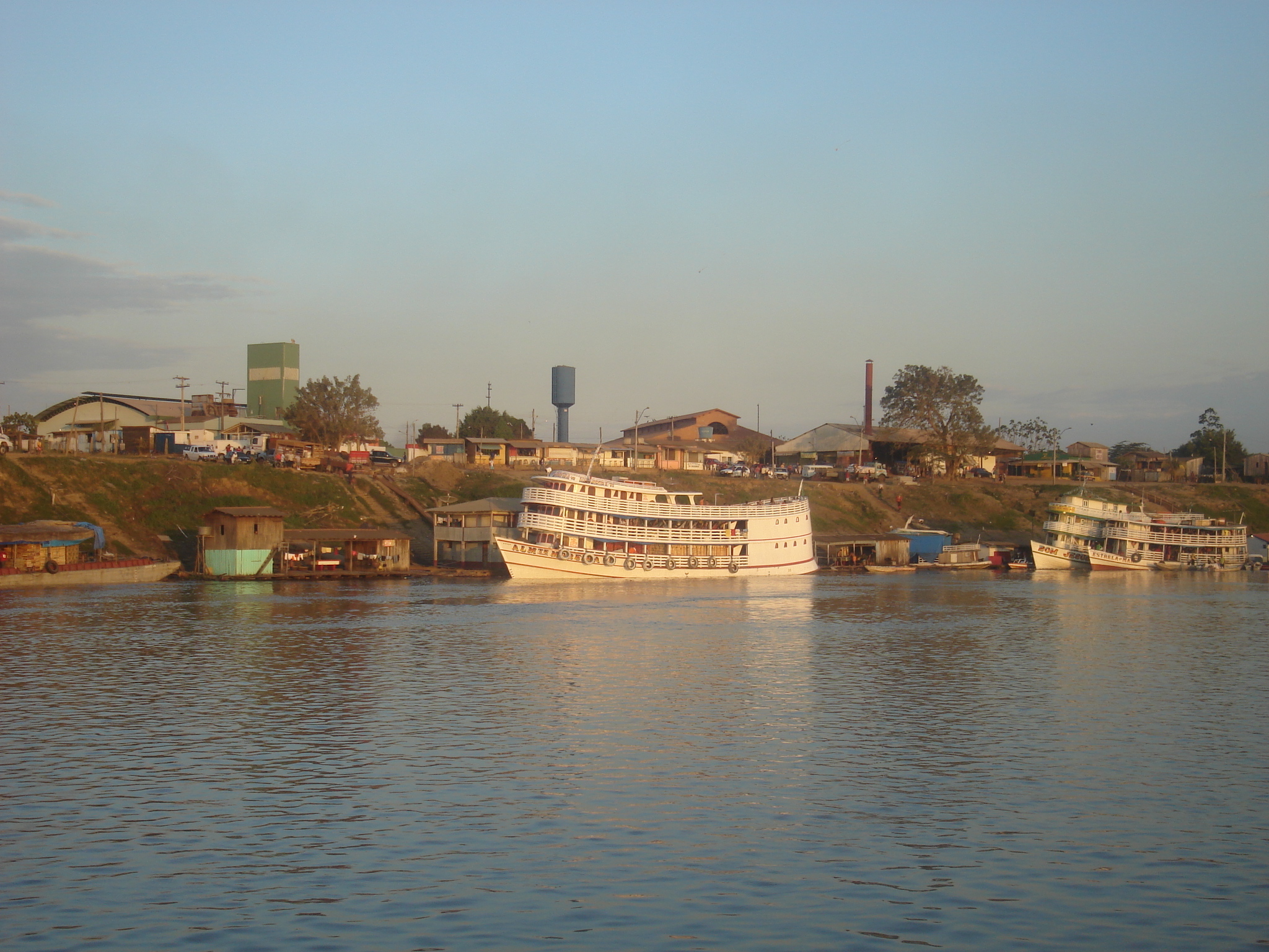 Porto do Cai n'Água, Porto Velho, Rondônia, Brasil Fonte Autor: Filipe Mesquita de Oliveira --Filipe Mesquita responde20px 15:40, 2 Agosto 2006 (UTC)